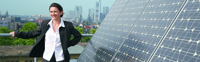 Prof. Dr. Martina Klärle